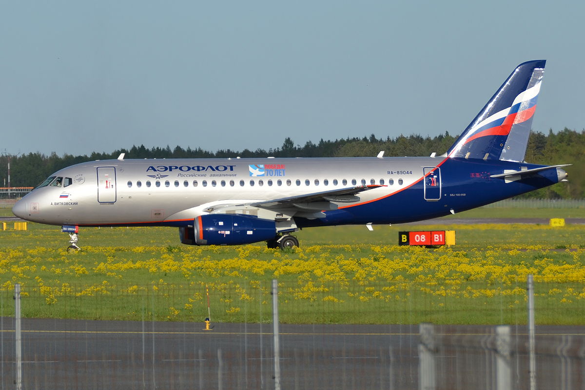 Aeroflot, RA-89044, Sukhoi Superjet 100-95B